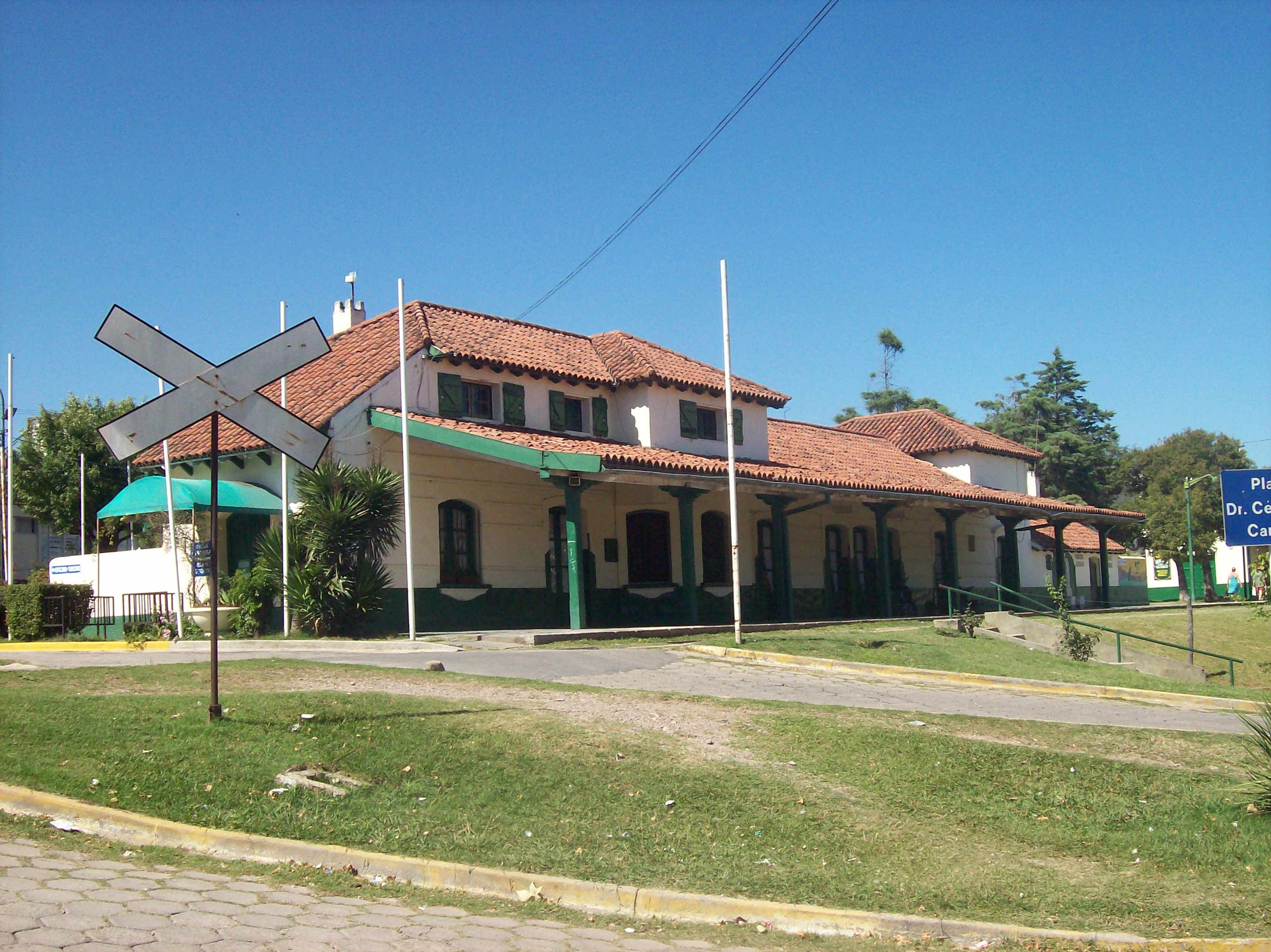 ex Estación La Falda, en la ciudad homónima, pcia. de Córdoba, Argentina.